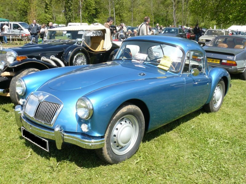 Français cadien: Photo prise à Chelles le 1er Mai 2012.